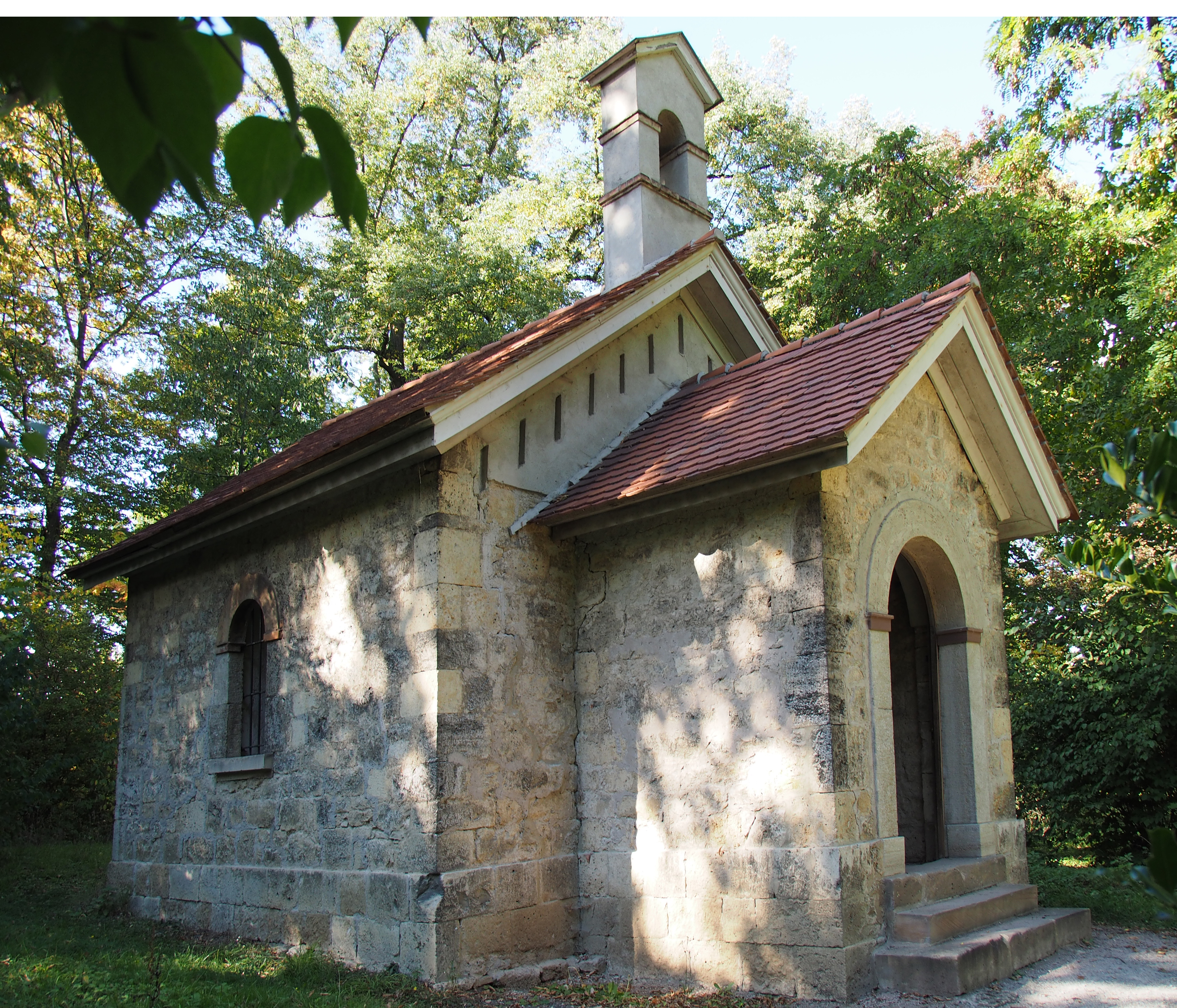 Eishaus am Schloss Belvedere (Weimar)